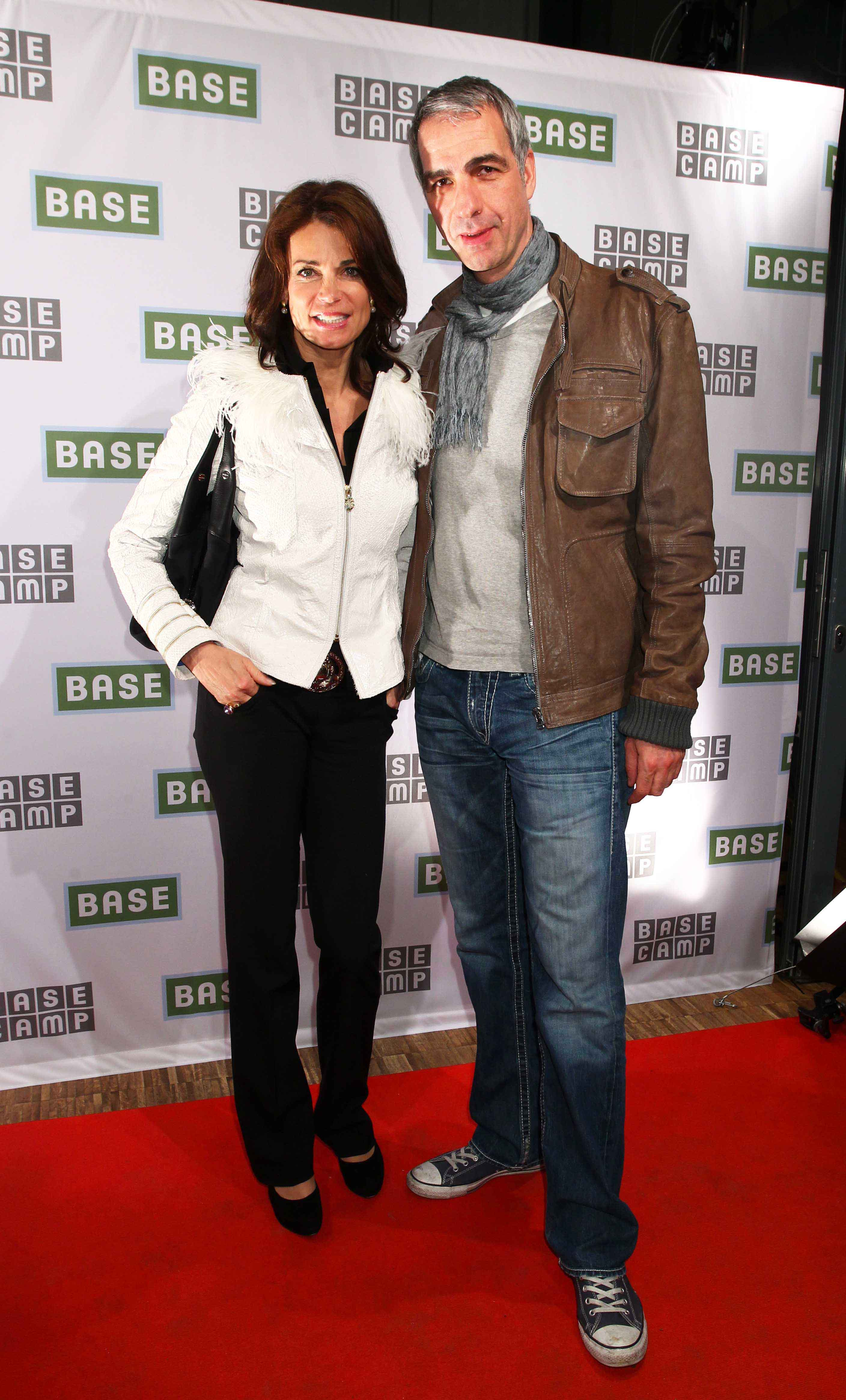 Gerit Kling mit Mann Stefan Hennig bei der Eroeffnung des neuen -Base-camp - in den Kaiserhoefen Unter den Linden -in Berlin